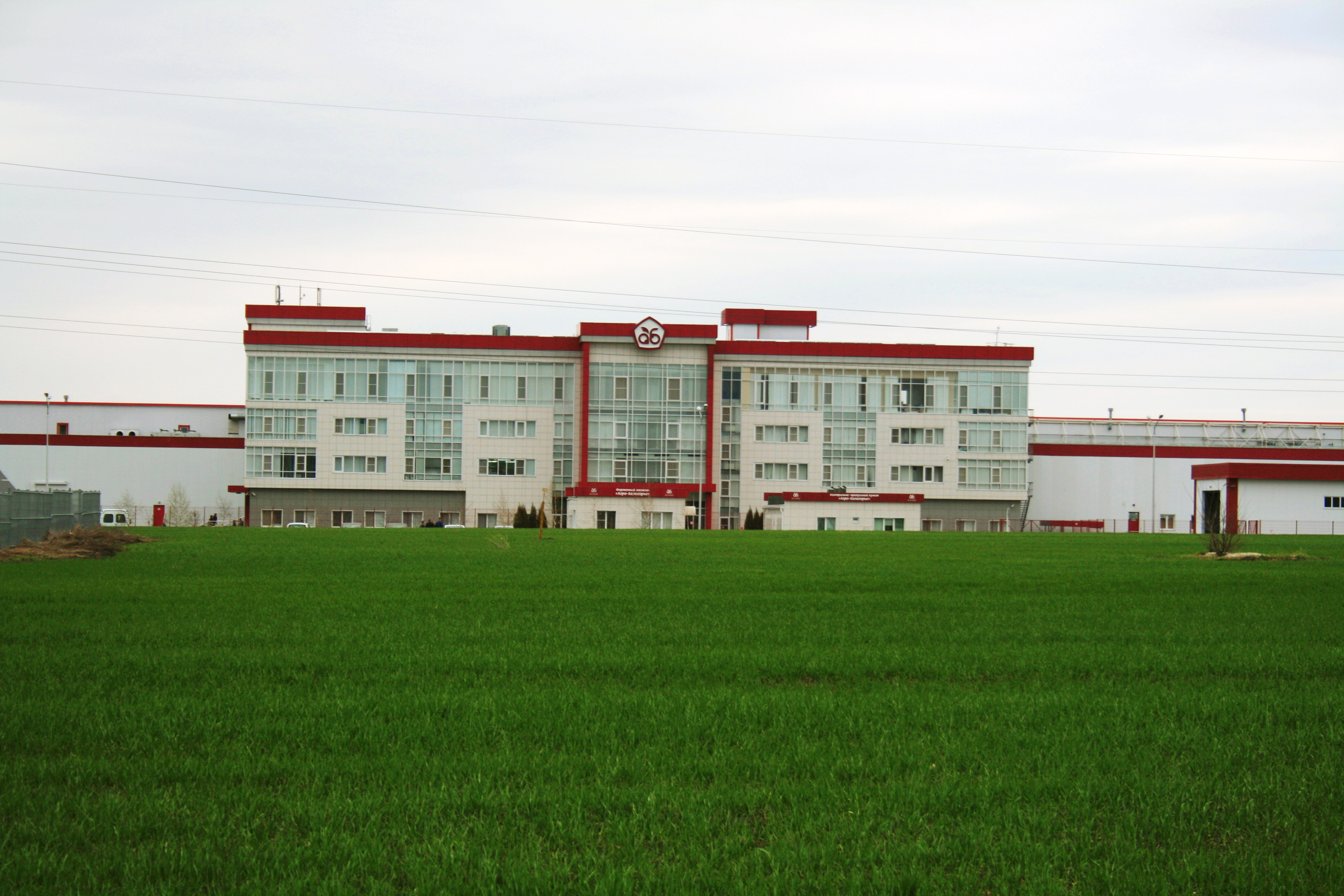 Мясоперерабатывающий завод «АгроБелогорье» (ООО «МПЗ Агро-Белогорье»). Яковлевский район